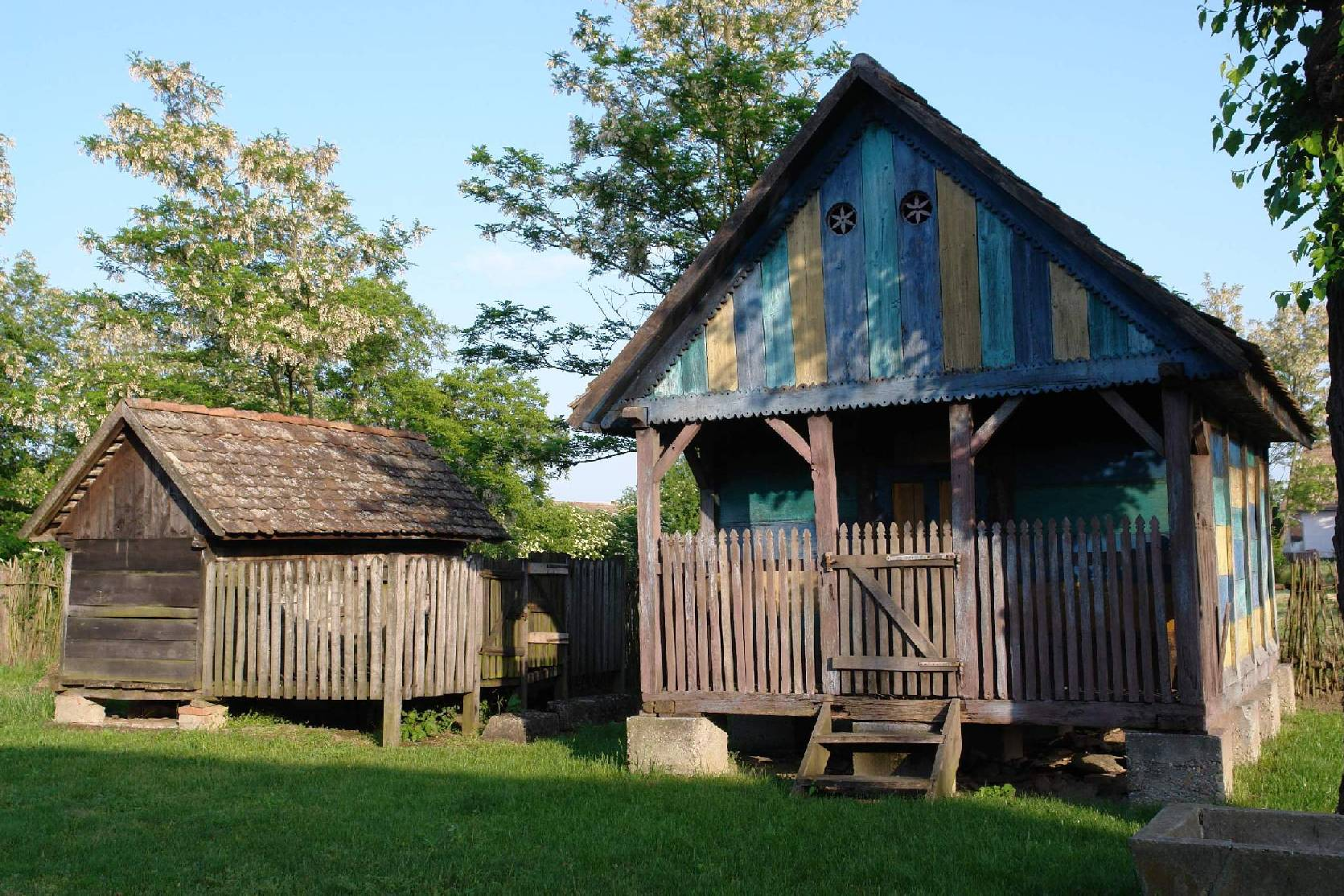 premontrei prépostság templom romjai This is a photo of a monument in Hungary. Identifier: 7623